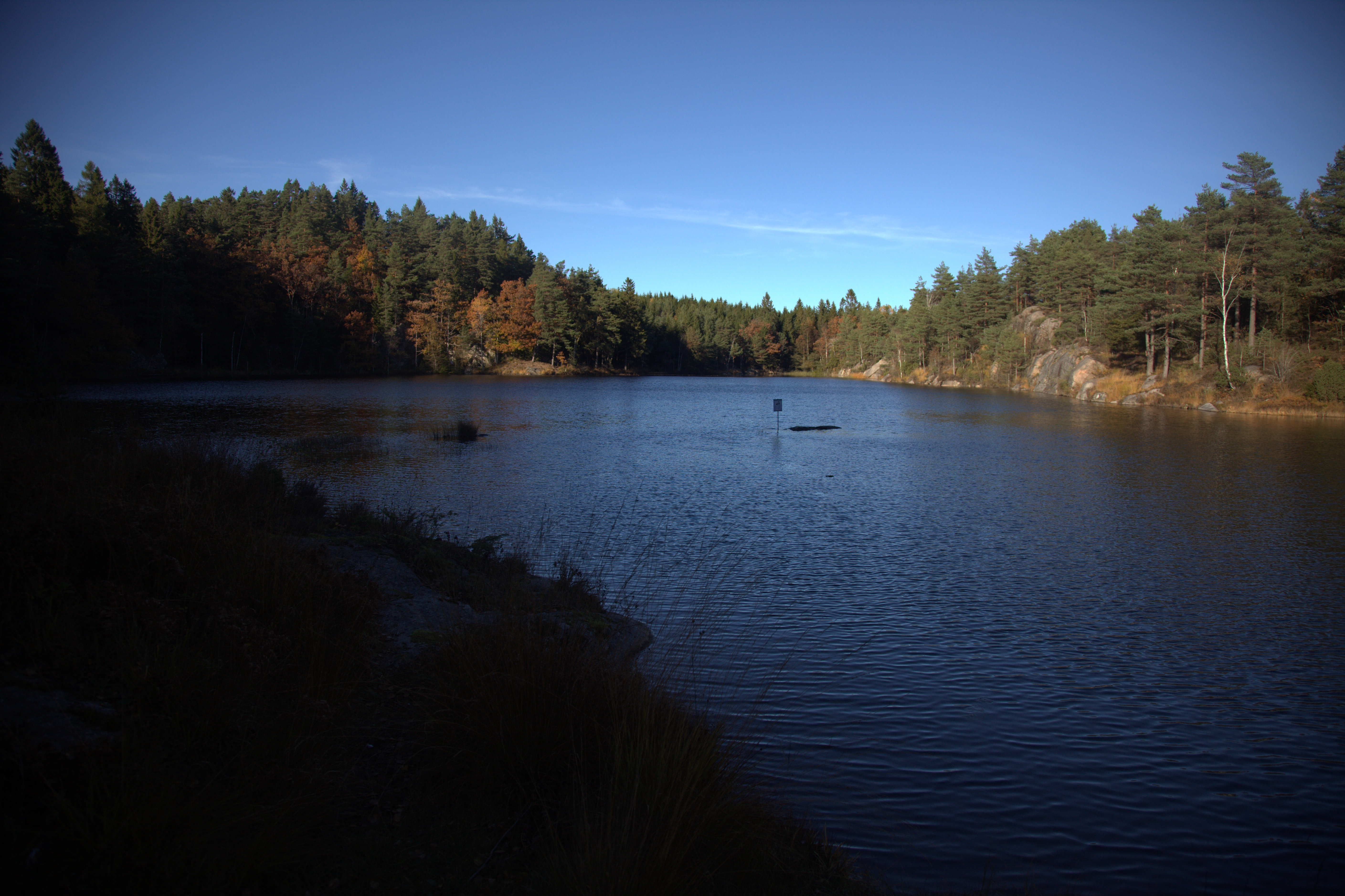 Hungersvatten i Kungälvs kommun